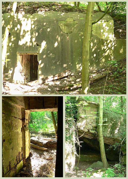 NSG Wiesenbatterie Schillig: Bunkeranlagen der Wiesenbatterie in zwischen Minsen und Schillig (zwei Ortsteile von Wangerland im Landkreis Friesland)